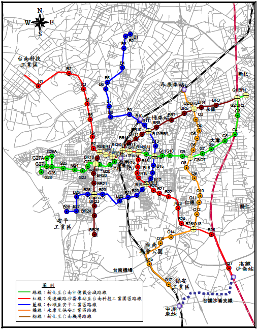 台南捷運早期的路網規畫方案之一